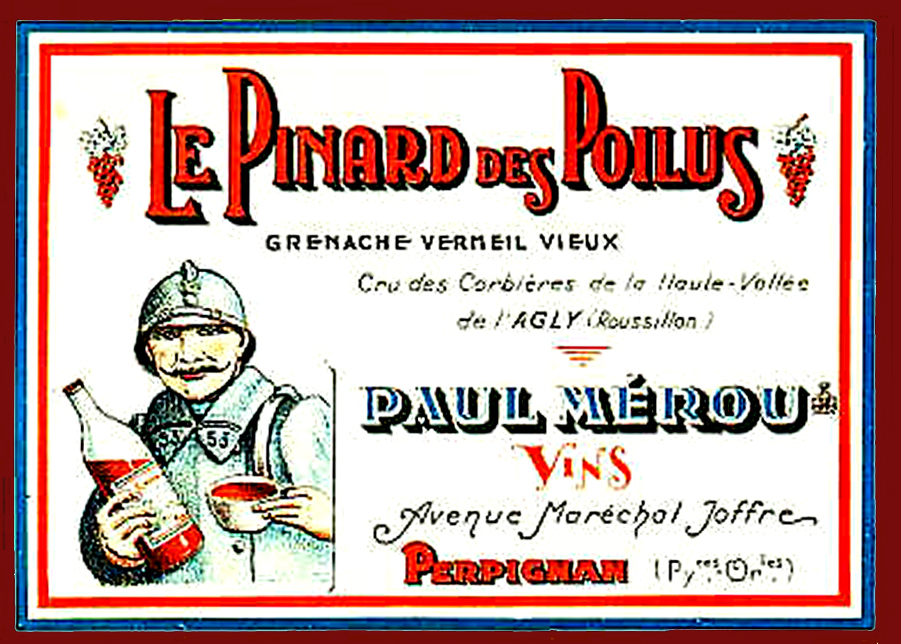 Le vin des Poilus